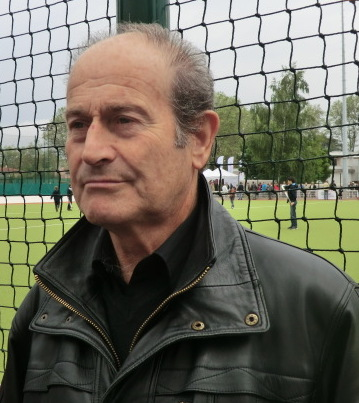 Jean-Paul Sauthier en marge de la finale du championnat de France 2013 à Caluire-et-Cuire.